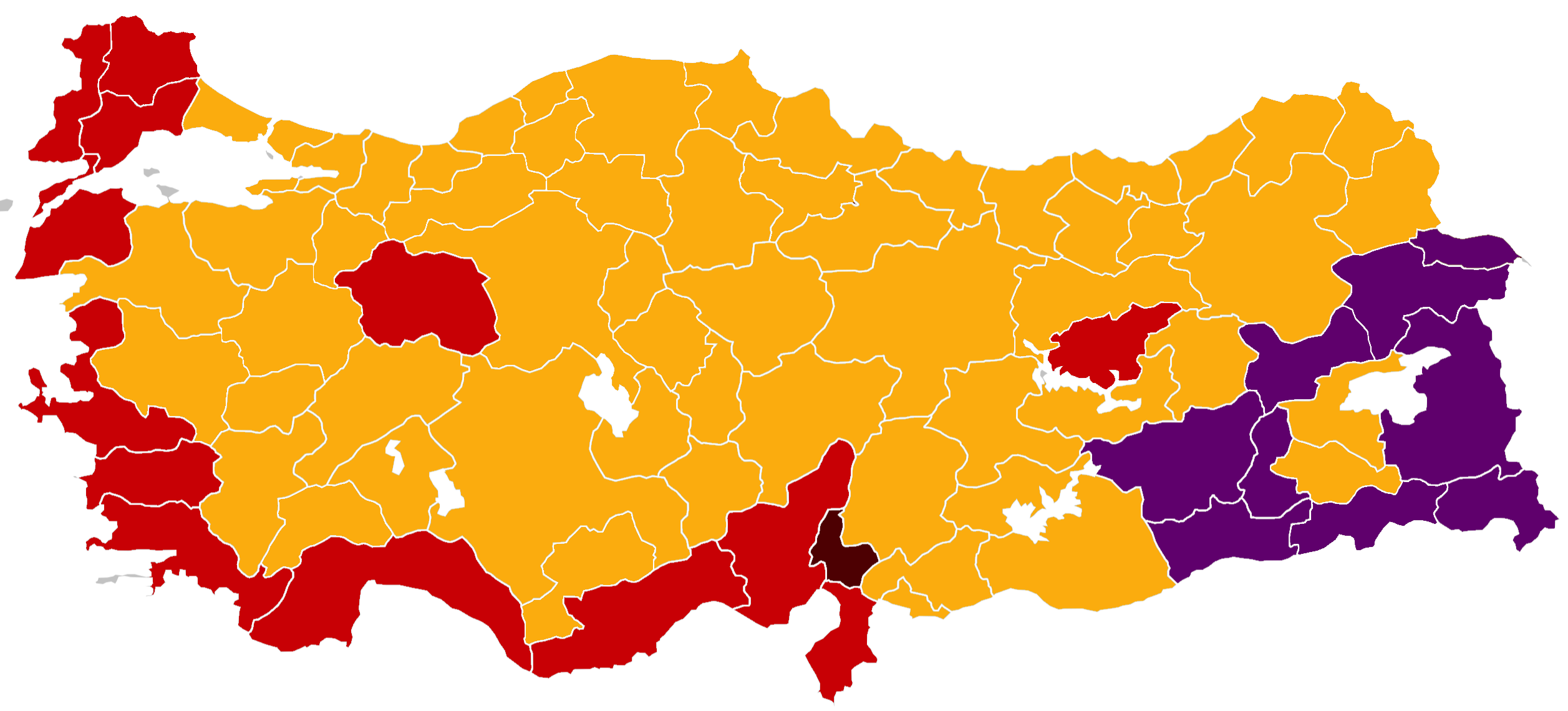 Sieger in den Provinzparlamenten der Provinzen.